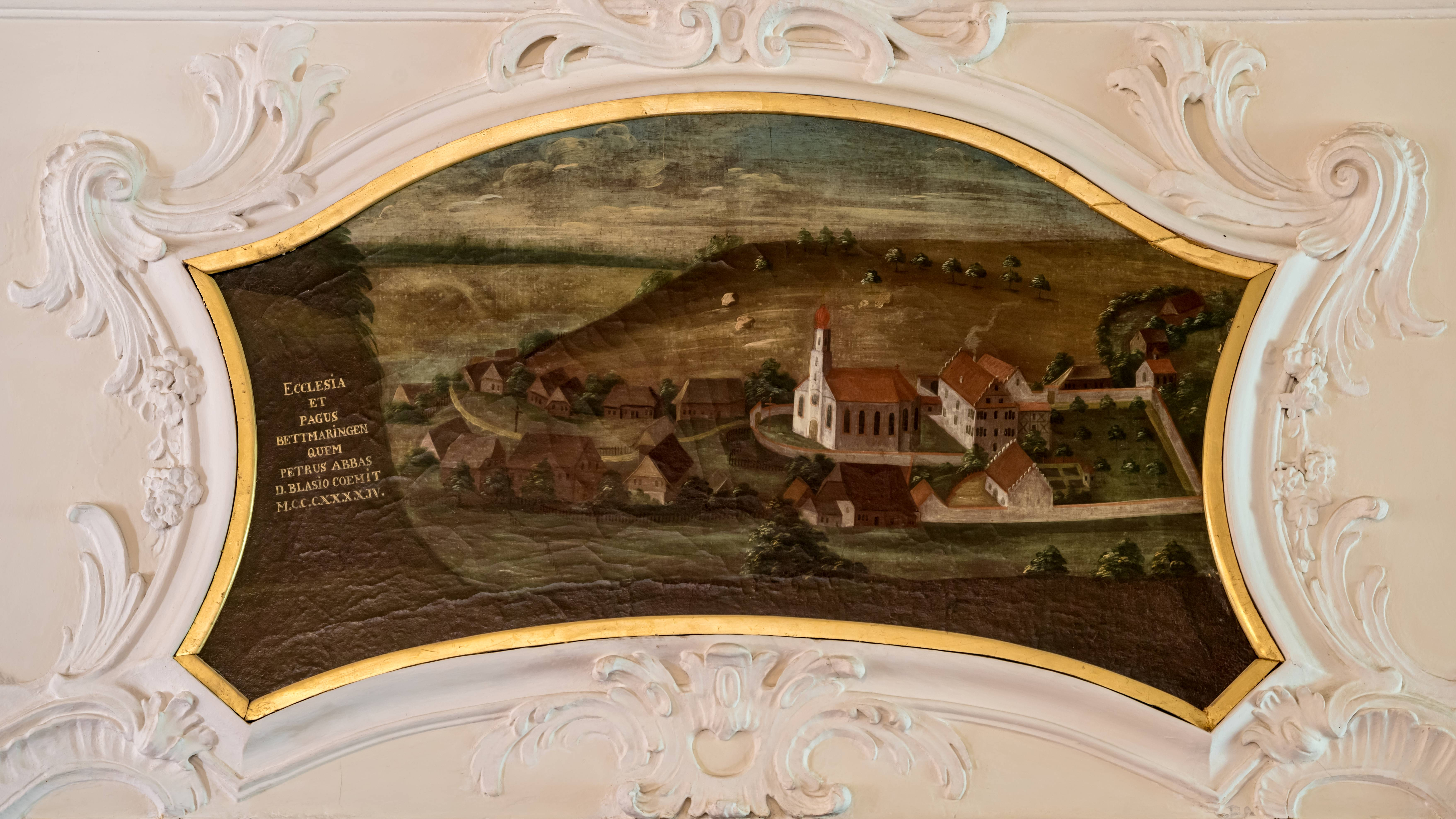 Bilder aus dem Schloß Bürgeln Hier Bilder von den Supraporten im ersten Stock des Schloßes. Es sind Bilder der Probsteien des Kloster St. Blasien und einige Füllbilder in einem später erstellten Flügel ECCLESIA ET PAGUS BETTMARINGEN QUEM PETRUS ABBAS D. BLASIO COEMIT M.C.C.C.X.X.X.IV.